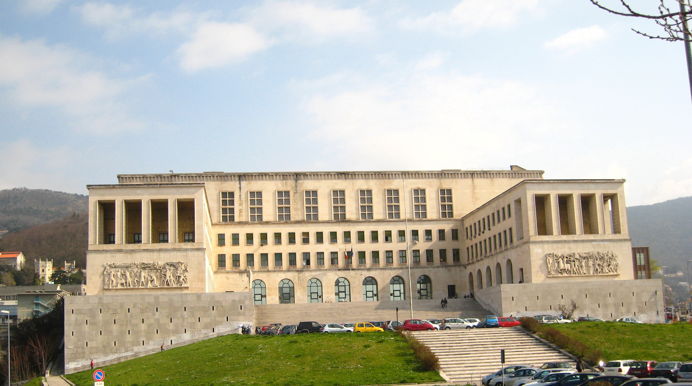 Università degli studi di Trieste - Italia. Marzo 2008